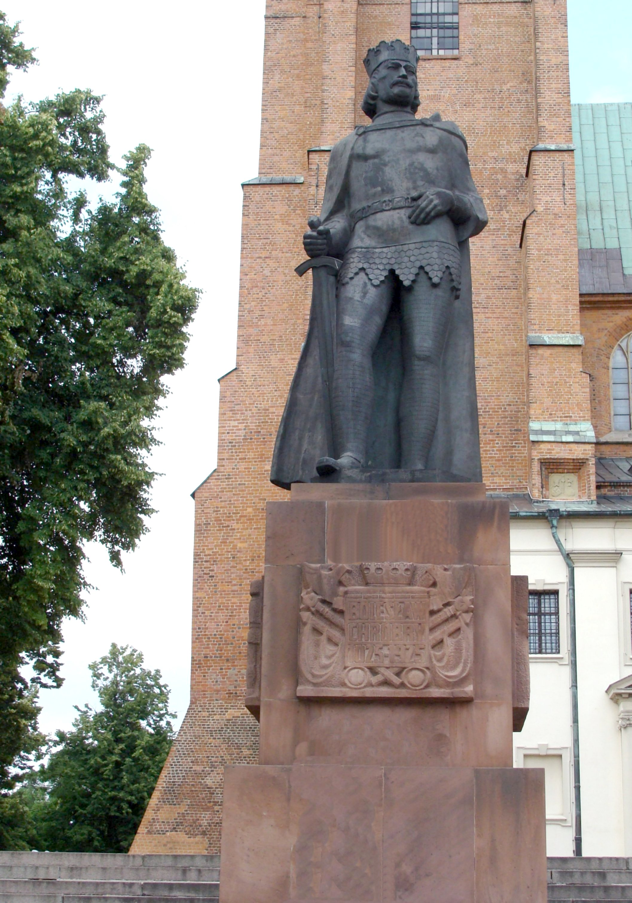 Bolesław Chrobry - pomnik przed katedrą w Gnieźnie